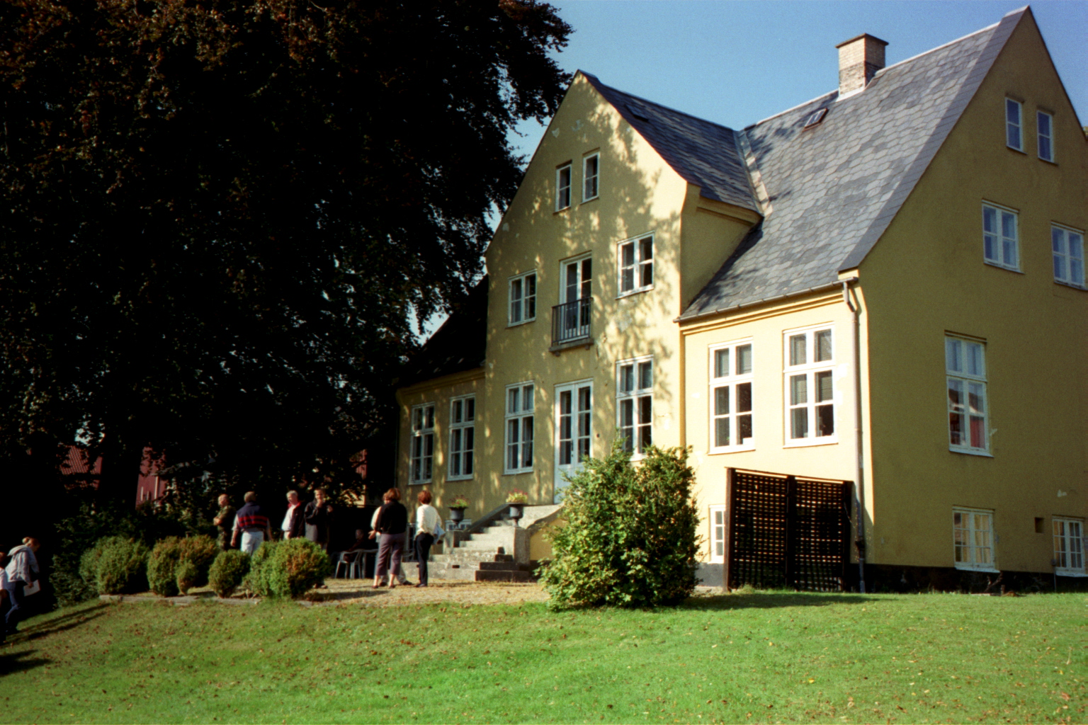 Sandholmgårds hovedbygning